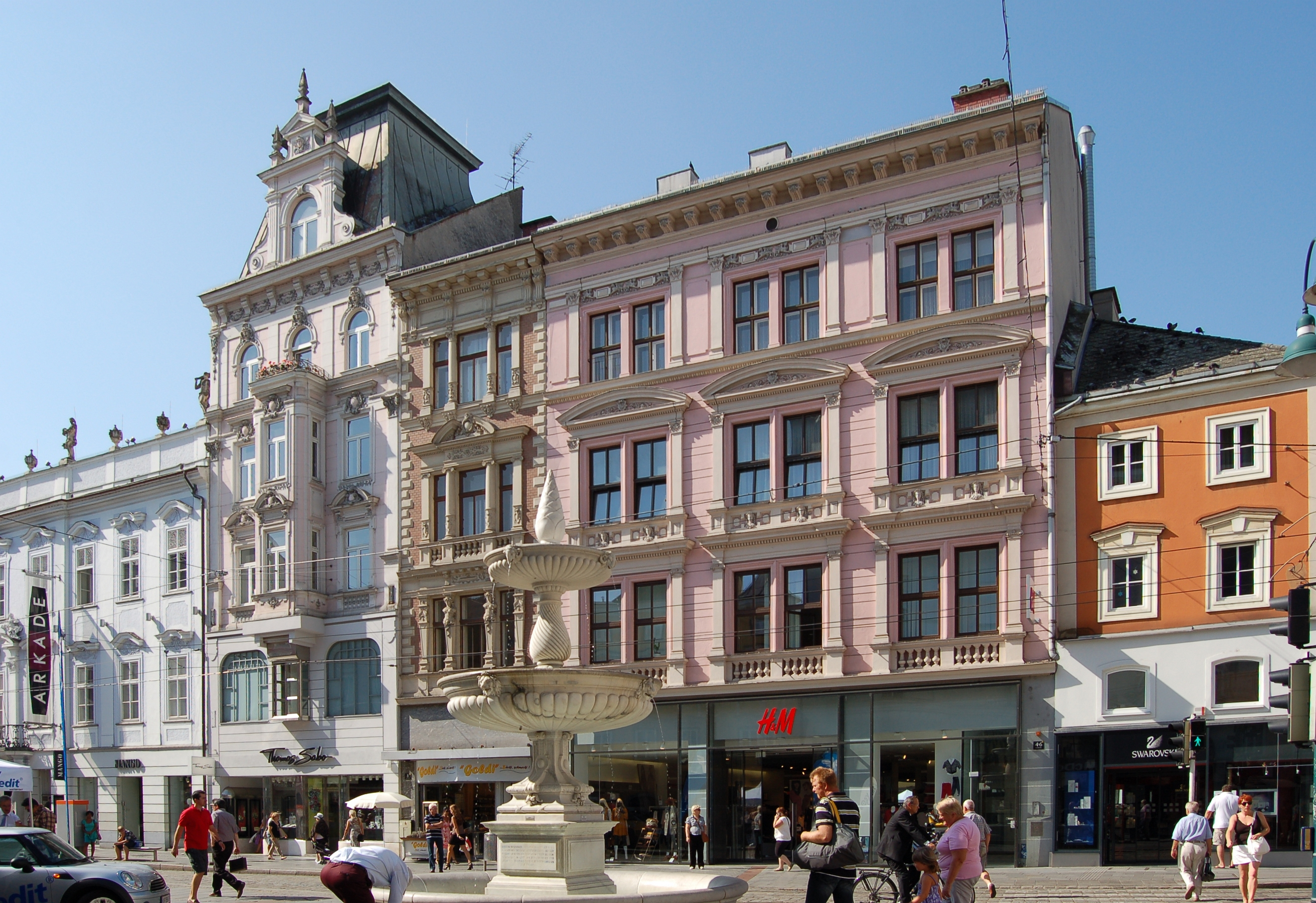 Die Gebäude in der Landstraße 2 bis 12 in Linz (Oberösterreich).